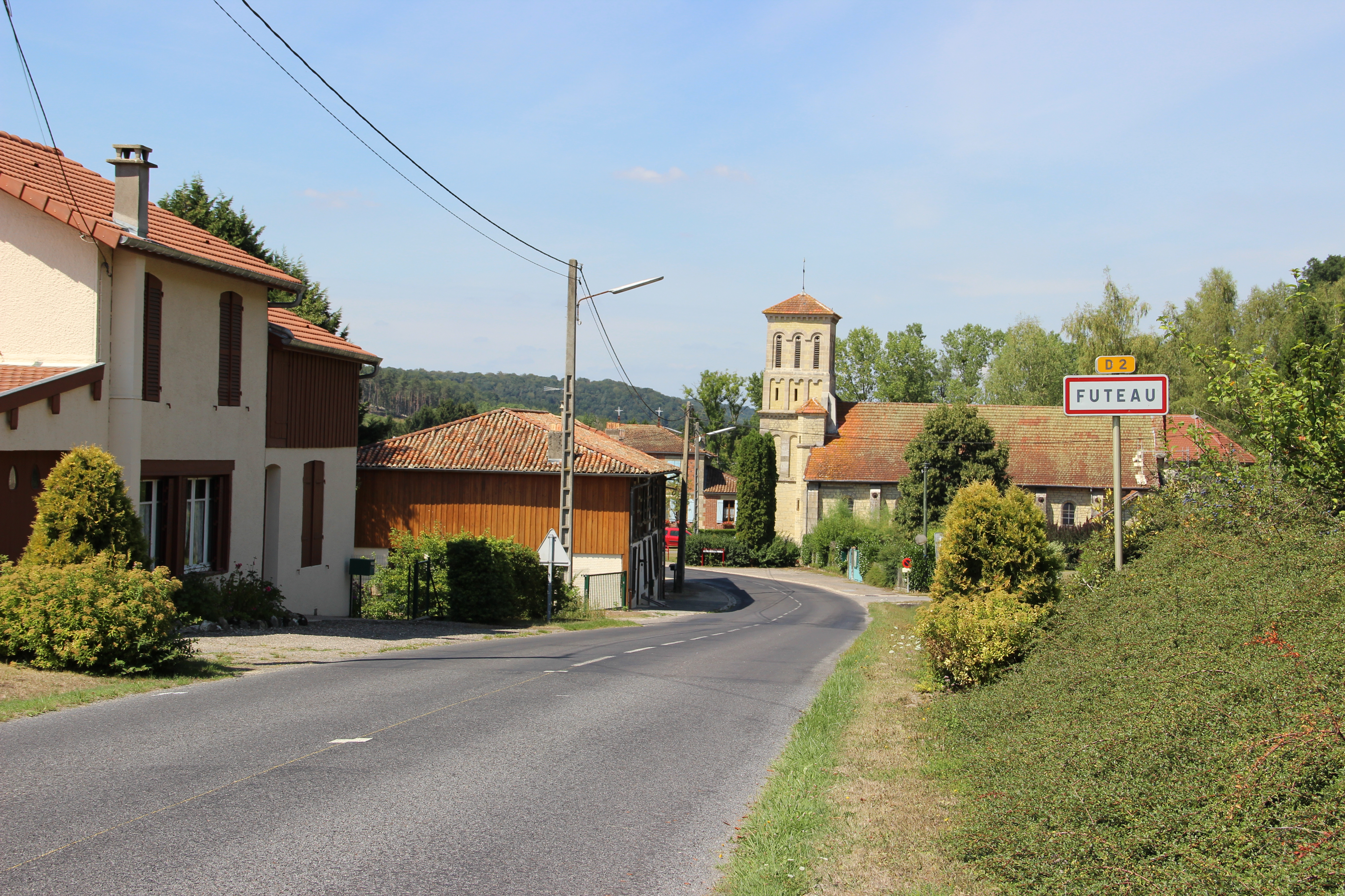 L'entrée du village de Futeau